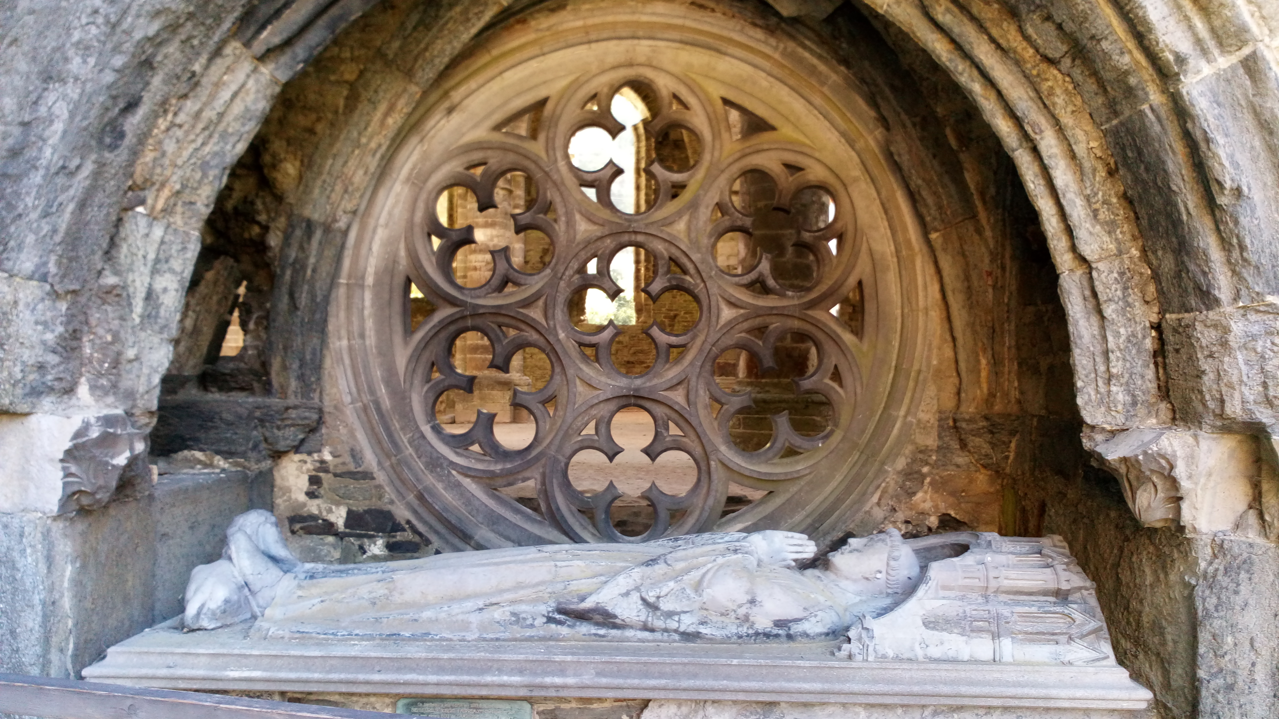 Tombeau (ou cénotaphe ?) édifié en 1283 à la mémoire du Bienheureux Gobert d'Aspremont Lynden, chevalier croisé, par son neveu, Guy de Dampierre,Comte de Flandre. Restauré en 1678 par le Feld Maréchal Ferdinand-Gobert d'Aspremont Lynden et sa femme Charlotte de Nassau. Saccagé sous la révolution française et restauré en 1932 par les soins de la famille reconnaissante. Abbaye de Villers la Ville (Belgique) près de l'entrée de la salle du chapitre, à droite du transept de l'église abbatiale.